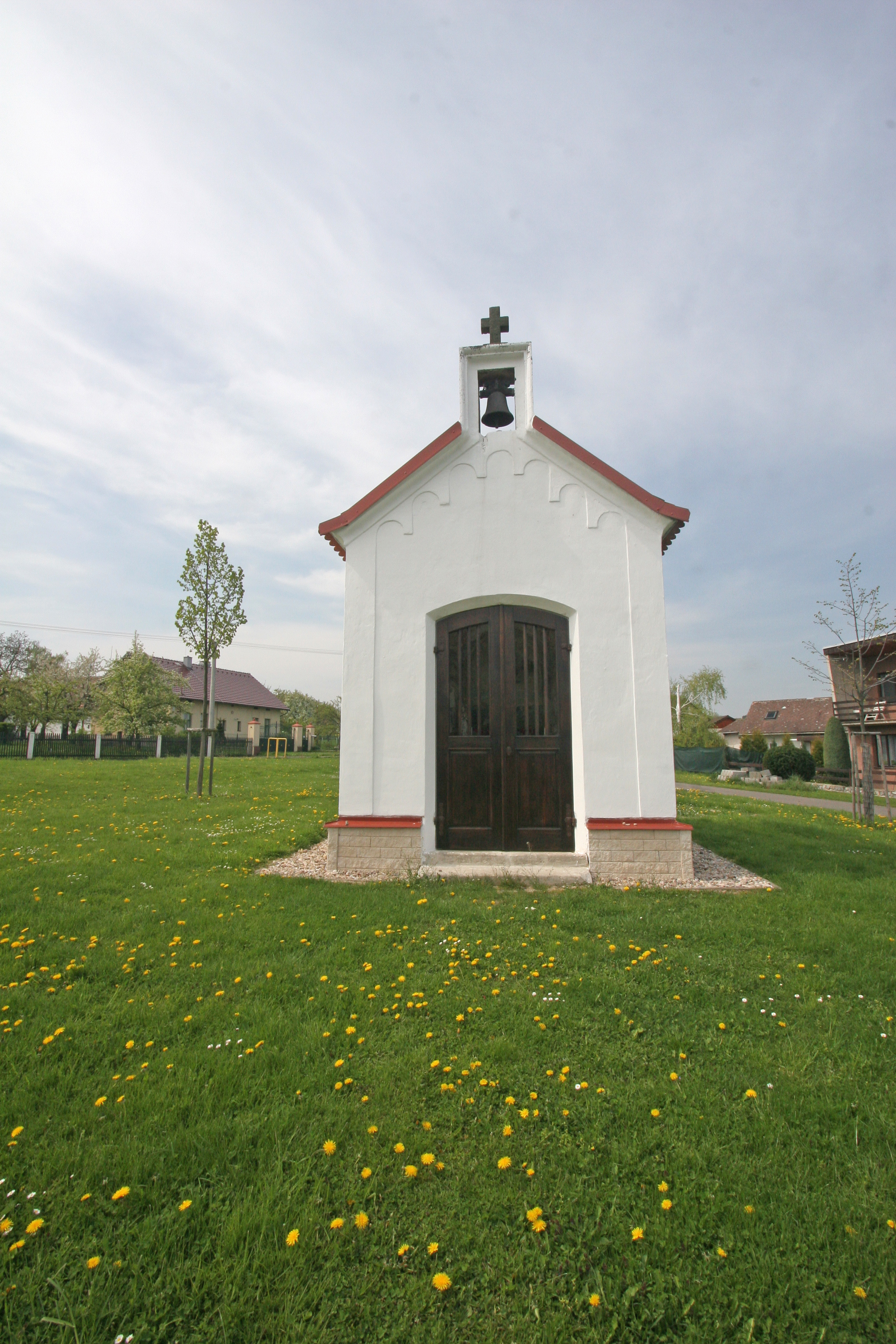 Chotěnice kaple svatého Václava